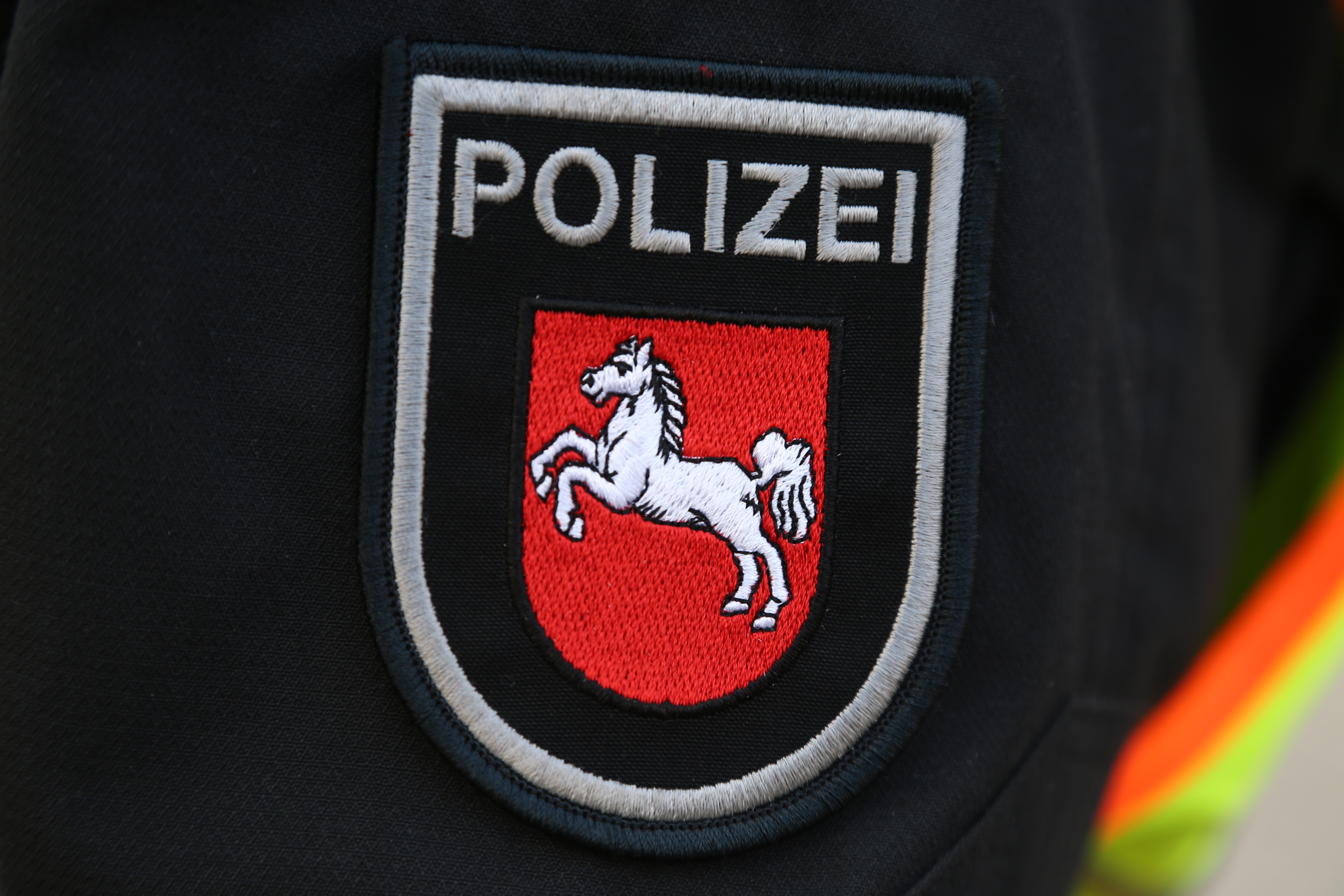 Ärmelwappen der Polizei Niedersachsen